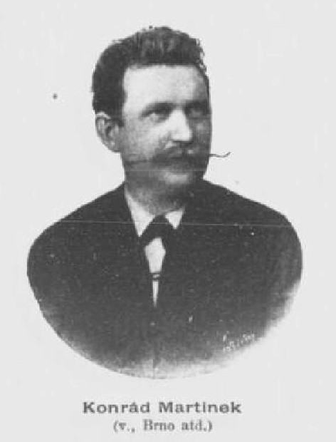 Konrád Martínek (1863-1916), rakouský a český politik